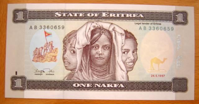 שטר של נקפה אחד, 1997, אריתראה. צילמתי.